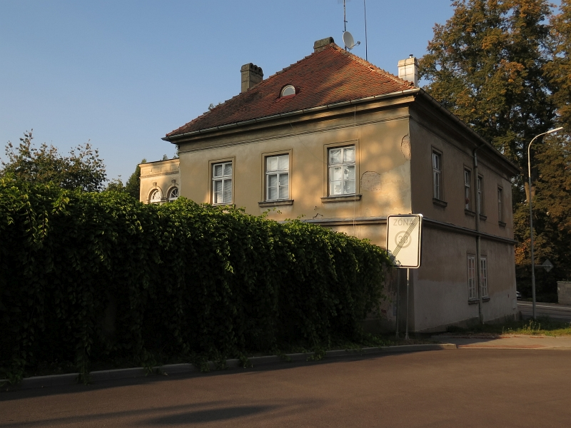 Karlov 151, Karlov 151, Jindřichův Hradec IV, Jindřichův Hradec.